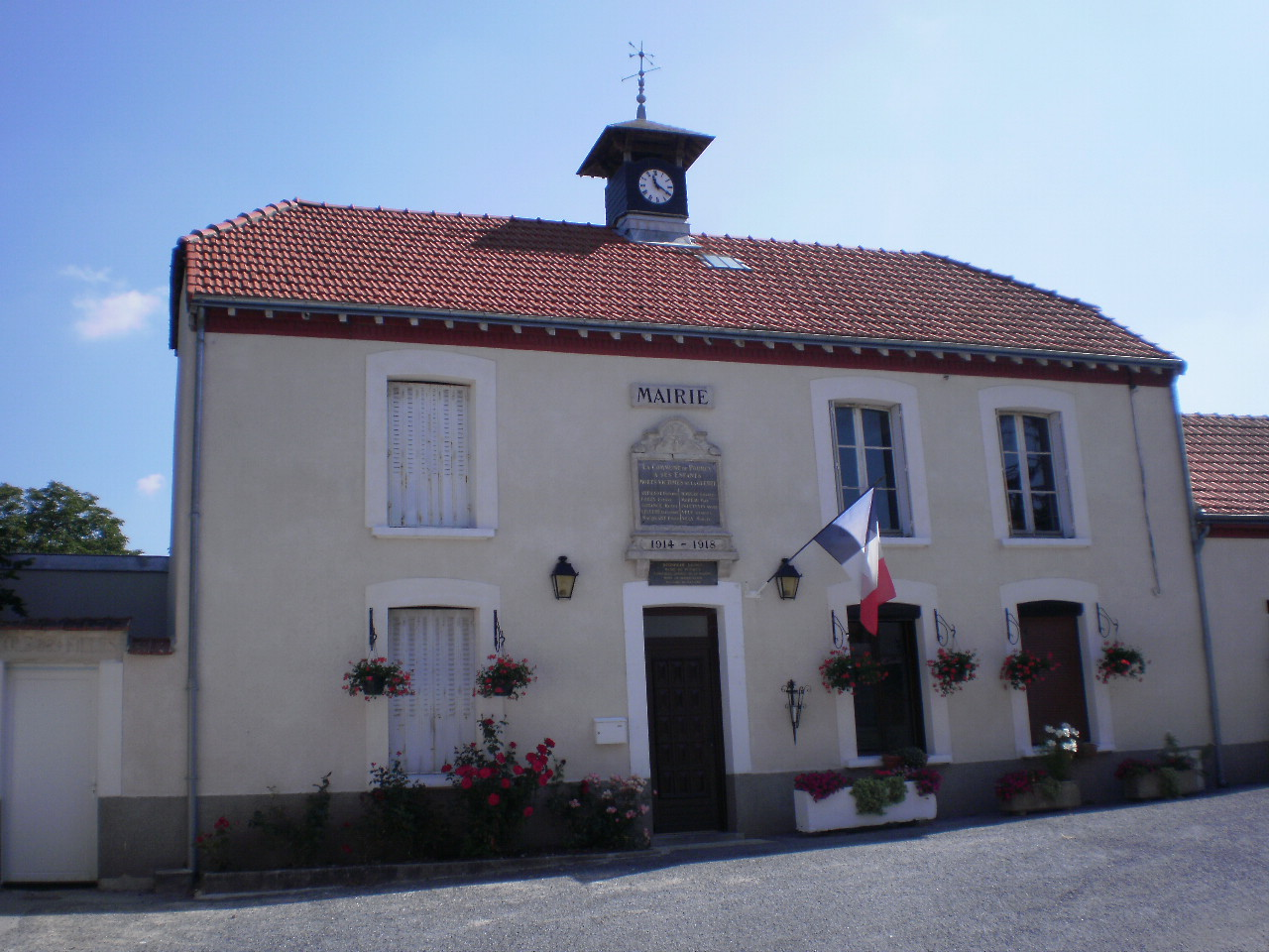 Mairie